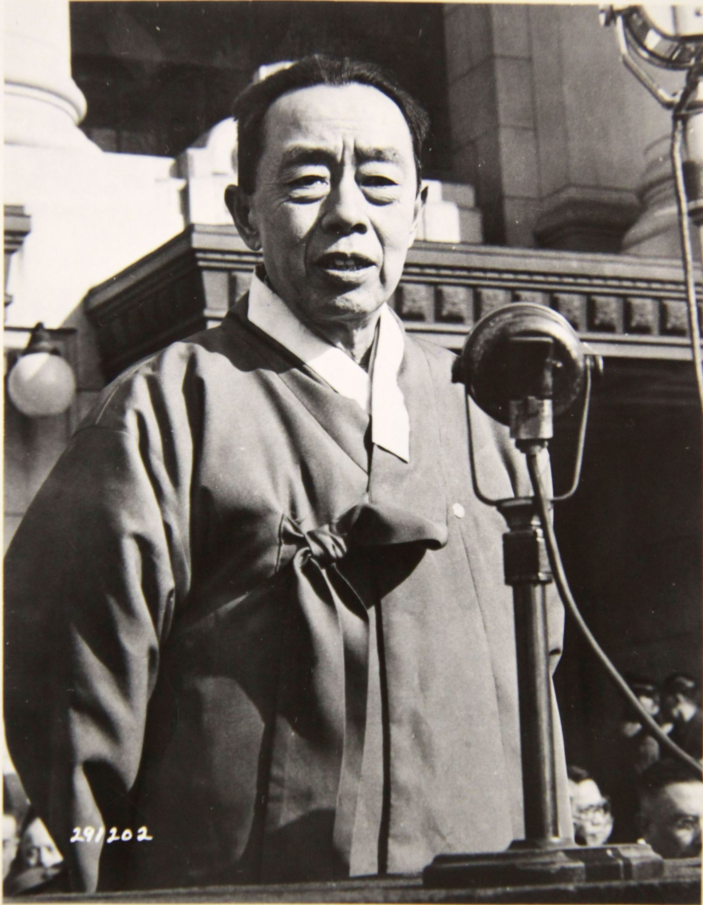 미군정기때 김규식 박사.